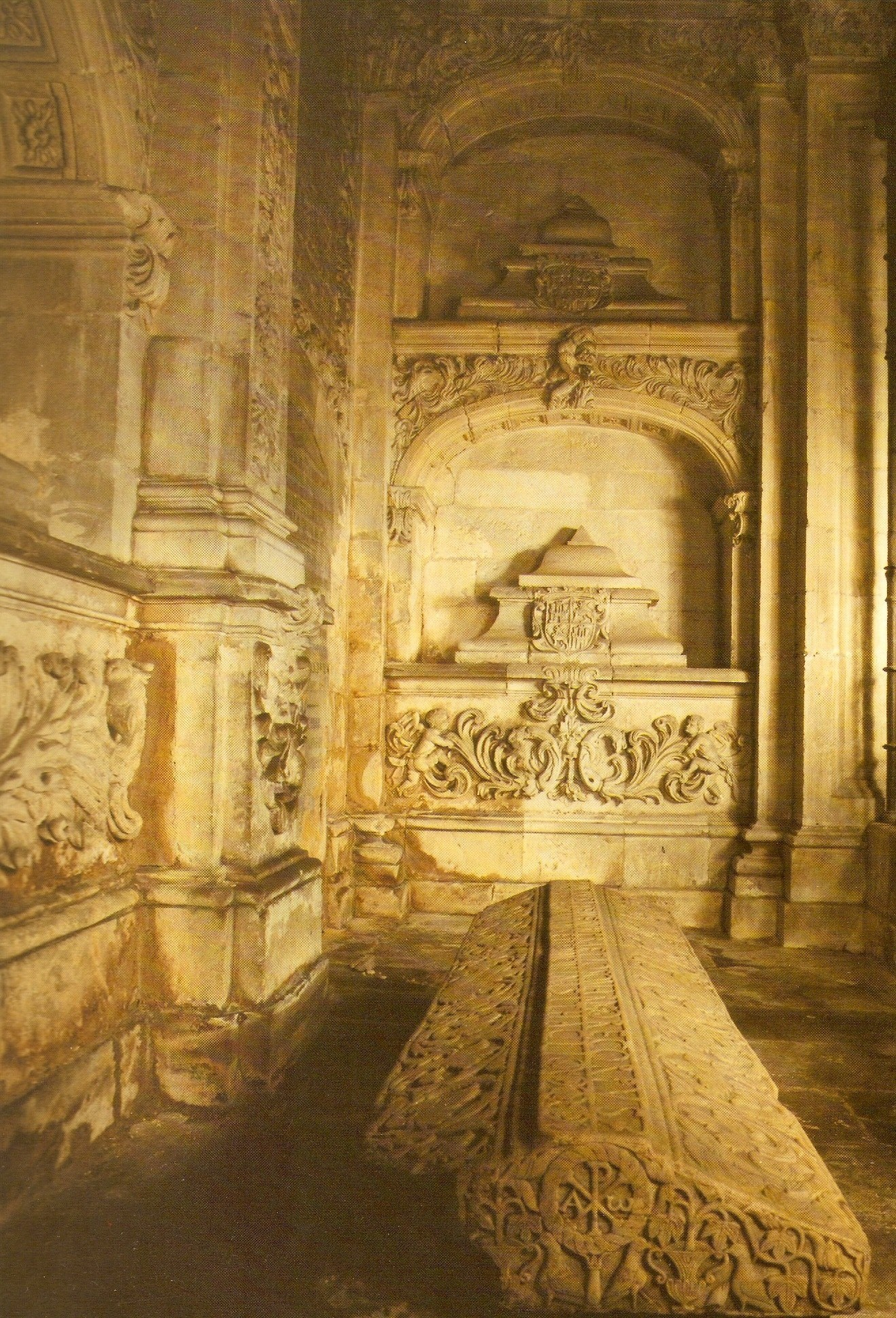 Panteón de reyes de la Catedral de Oviedo.